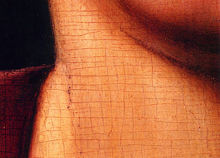 Um ein altes Gemälde vorzutäuschen, hat der Fälscher ein gitterförmiges Craquelé eingeritzt.